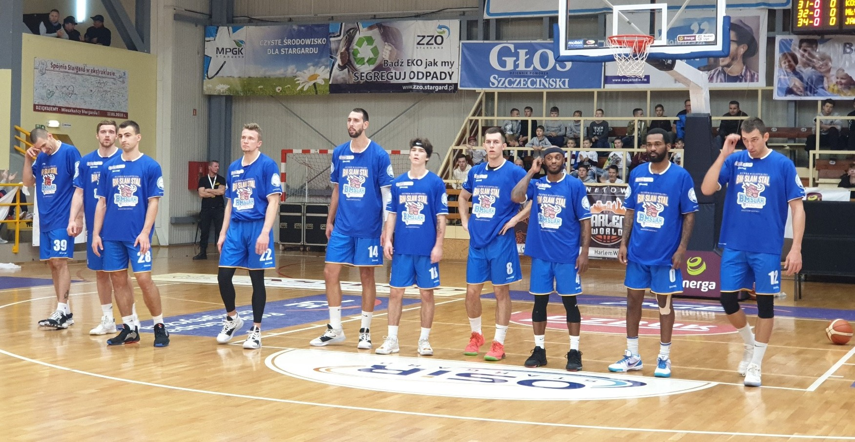 BM SLAM Stal Ostrów Wielkopolski